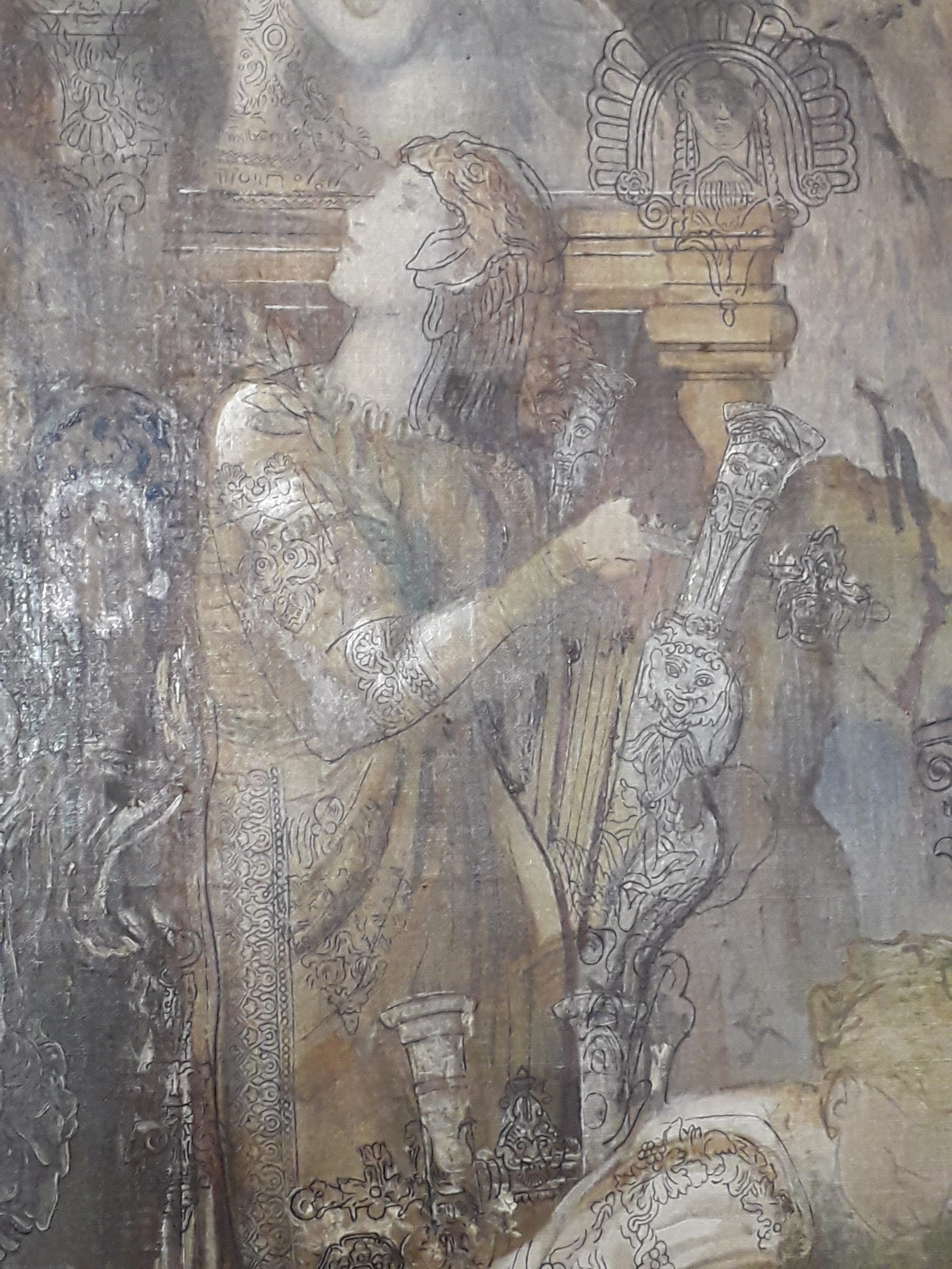 detail